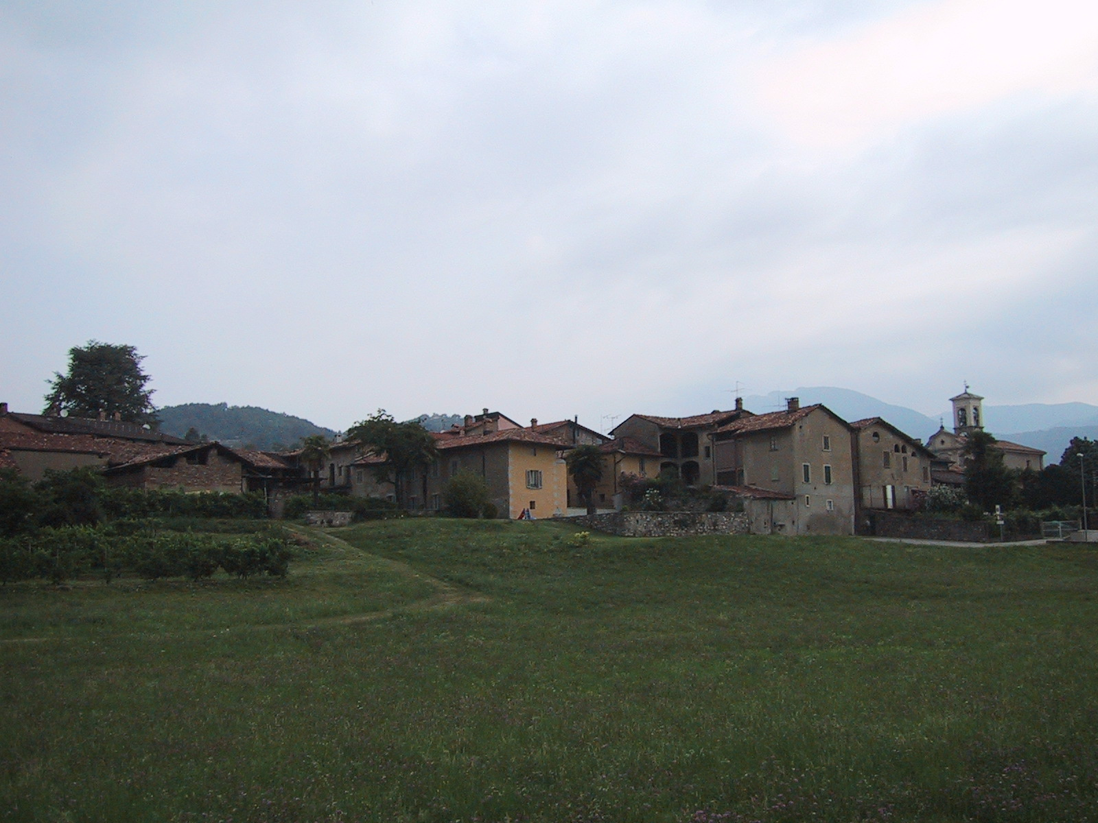 Aufnahme 26. Juli 2005, Dorfansicht von Ligornetto, Aufnahme aus südlicher Richtung, Kanton Tessin, Schweiz. Fotograf Peter Berger (selbst fotografiert). Lizenzstatus "GNU-FDL"